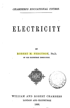 Portada del llibre Electricity (1866) de Robert MacNair Ferguson (1829-1912), matemàtic escocès